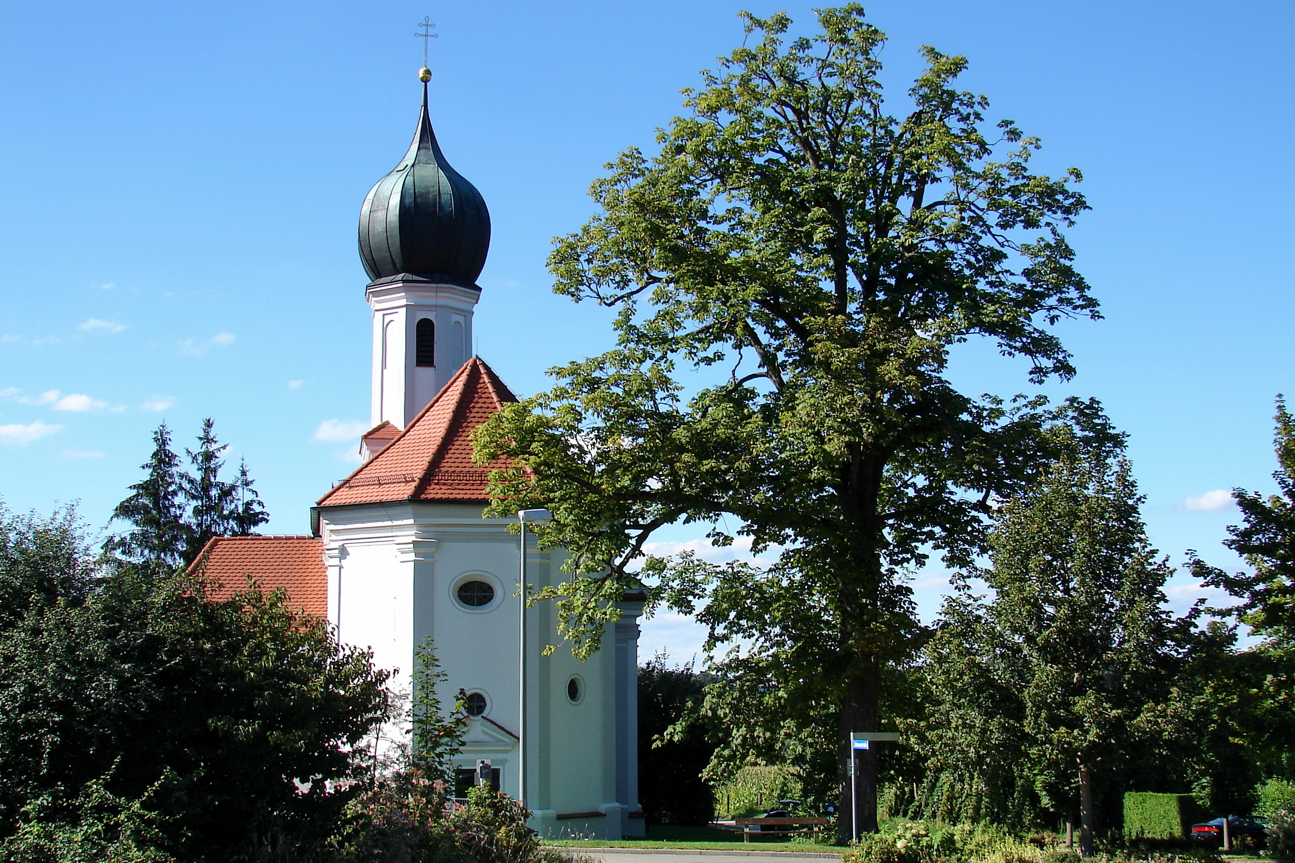 Die katholische Wallfahrtskirche Mariae Himmelfahrt in Lohwinden ist ein beliebtes Fotomotiv. Der Chor des barocken Gebäudes stammt aus dem Jahre 1679, Langhaus und Turm folgten 1701.